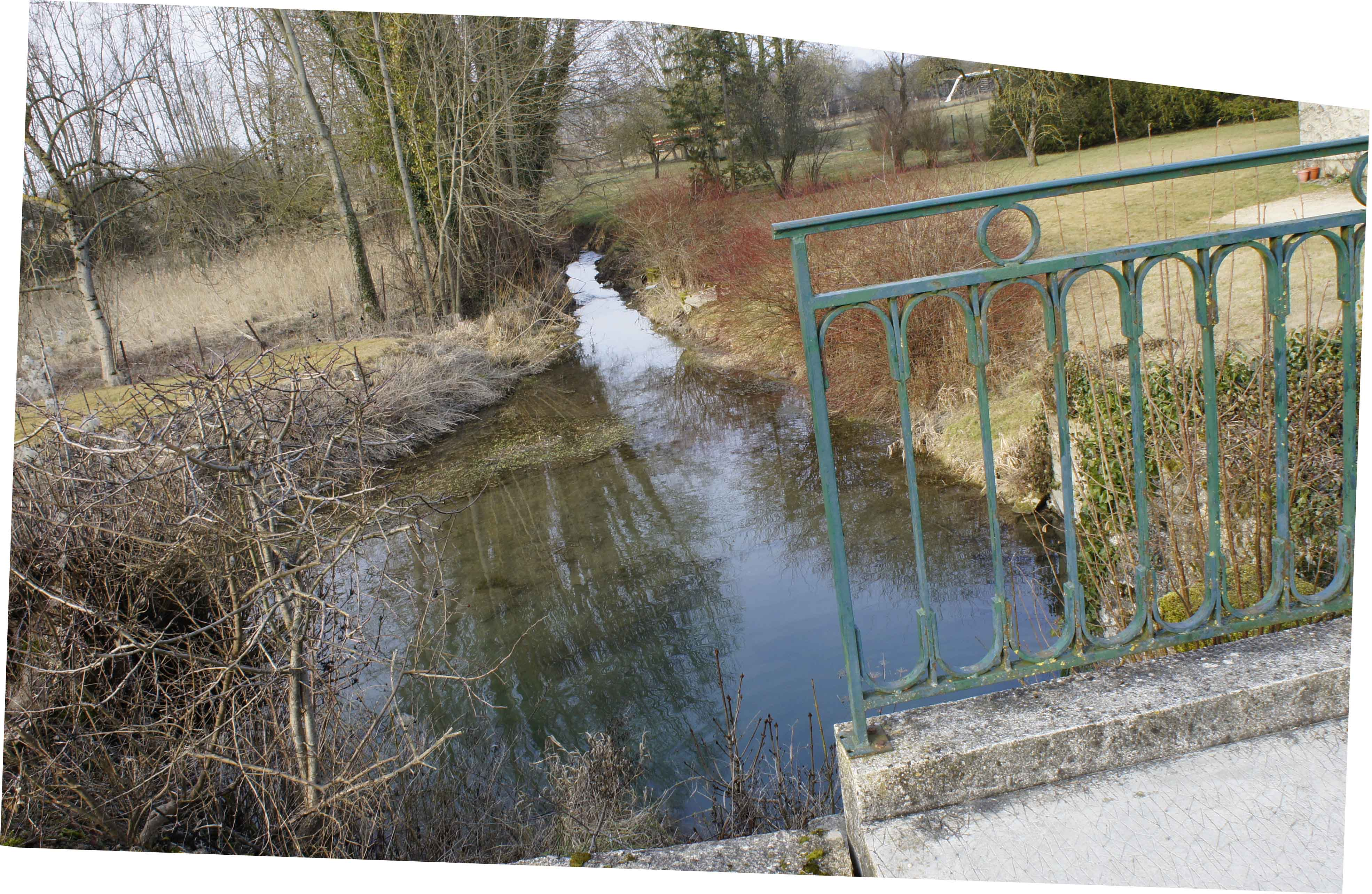 Dampierre le Château, une vue de l'Yèvre.